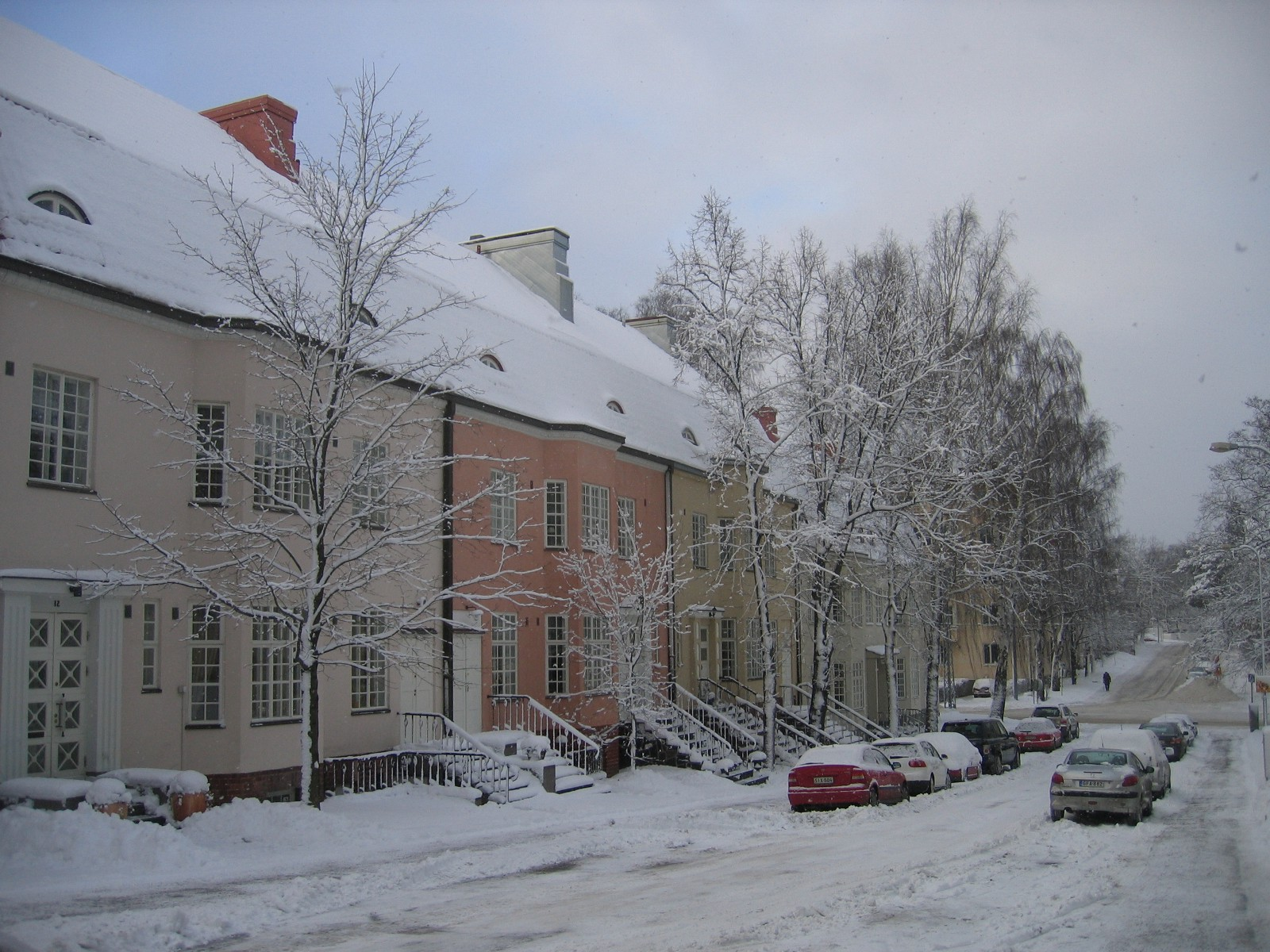 Hollantilaisentie/Holländarvägen in Munkkiniemi, Helsinki, Finland.